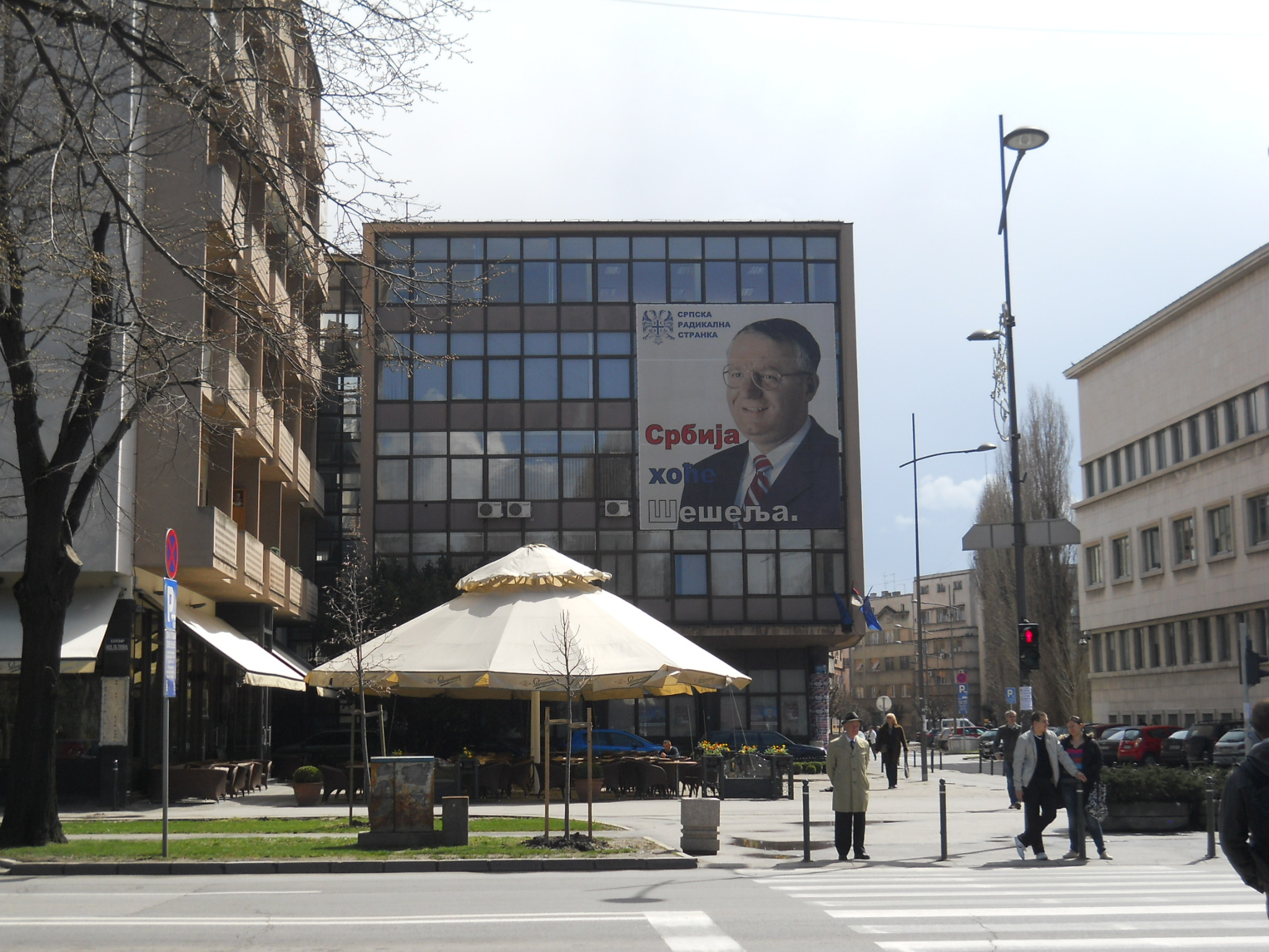 Újvidék - Bul. Mihajla Pupina